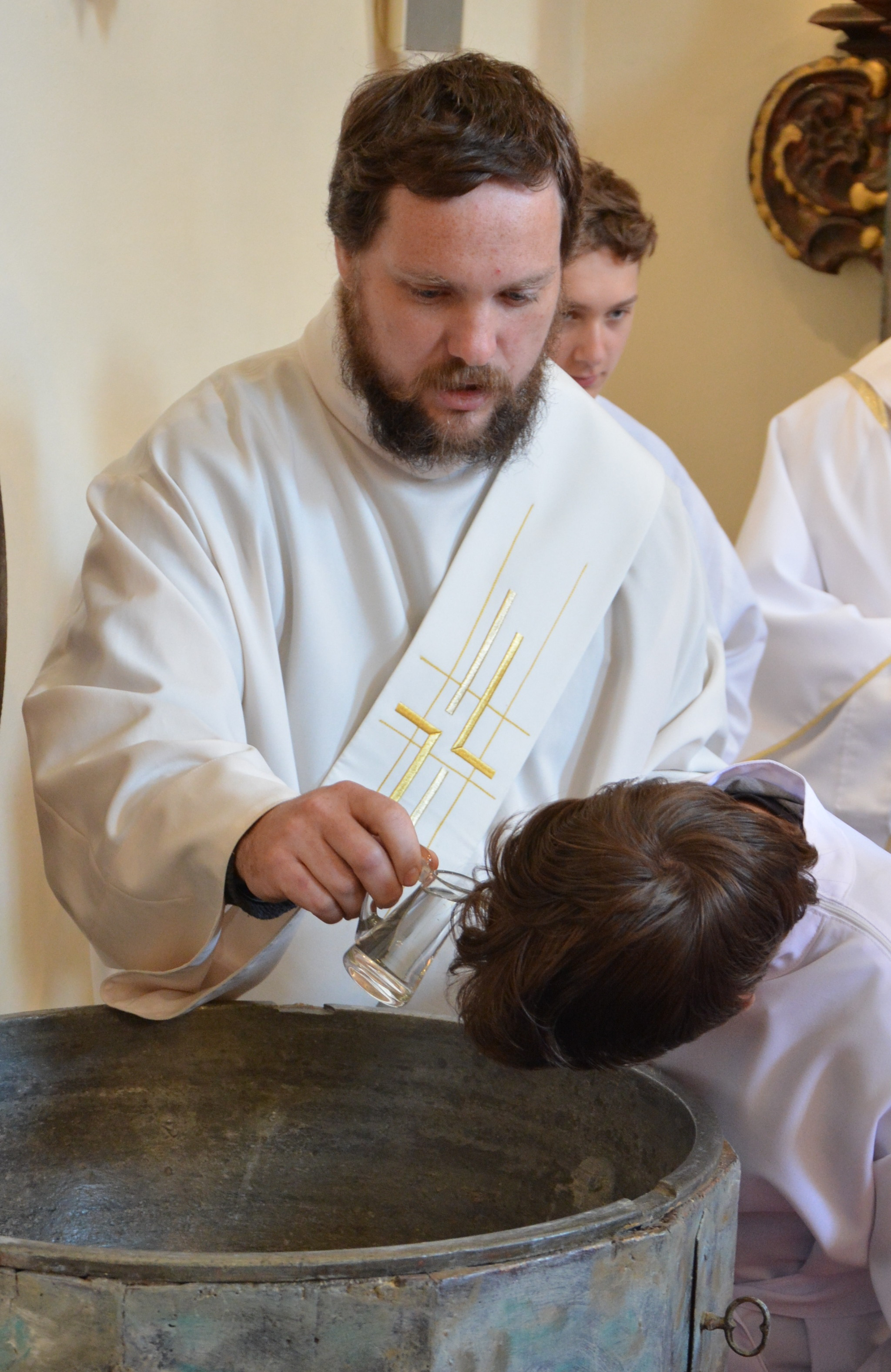 jáhen Václav Mikula uděluje křest v kostele v Hrobech